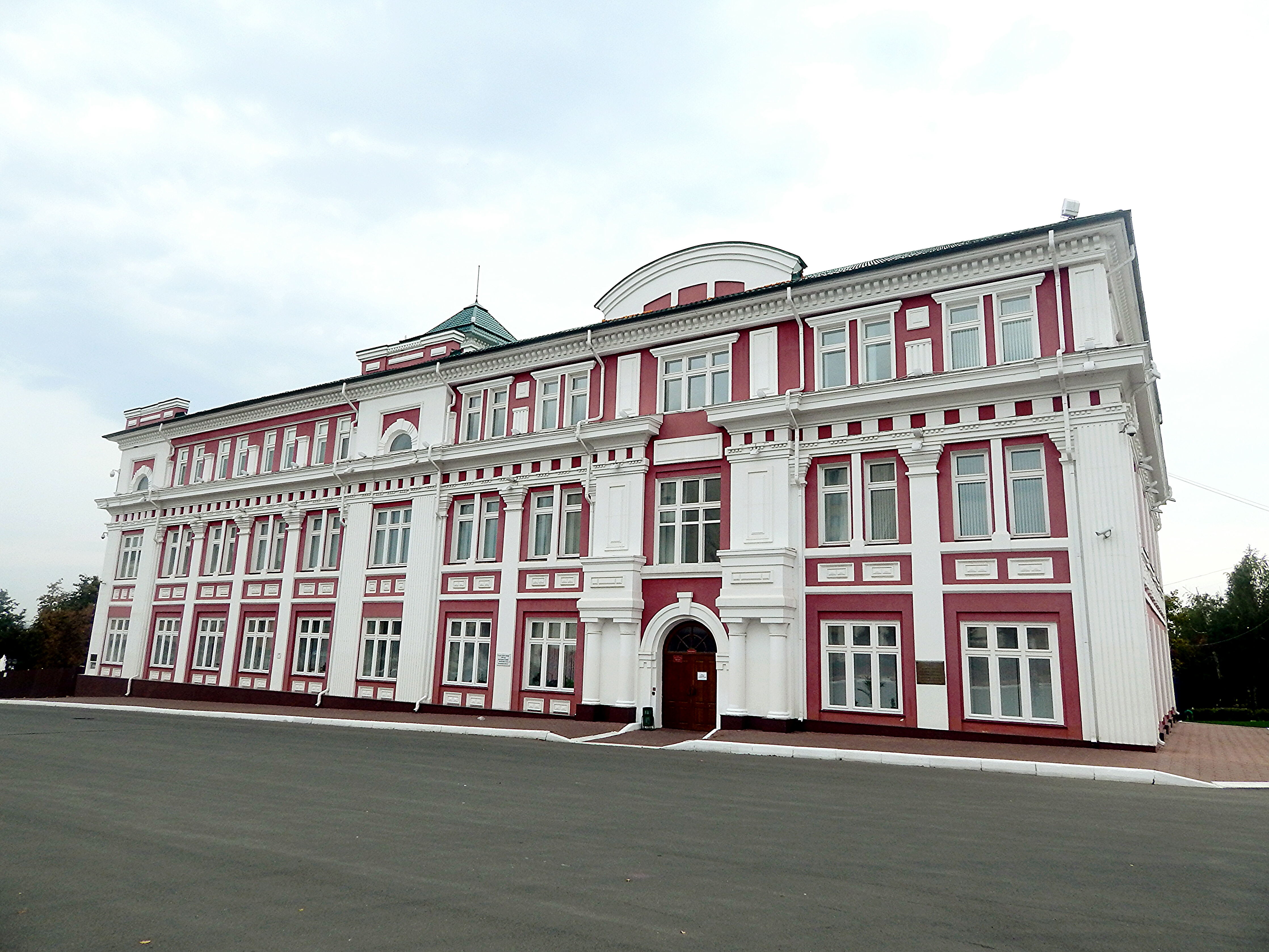 Дом, в котором был создан первый саранский уездный комитет РКП(б) и была провозглашена советская власть в уезде: улица Советская, 30, Саранск, Мордовия